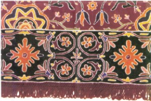 Arraiolos Sec XVII 1a Epoca - Pe de Flor